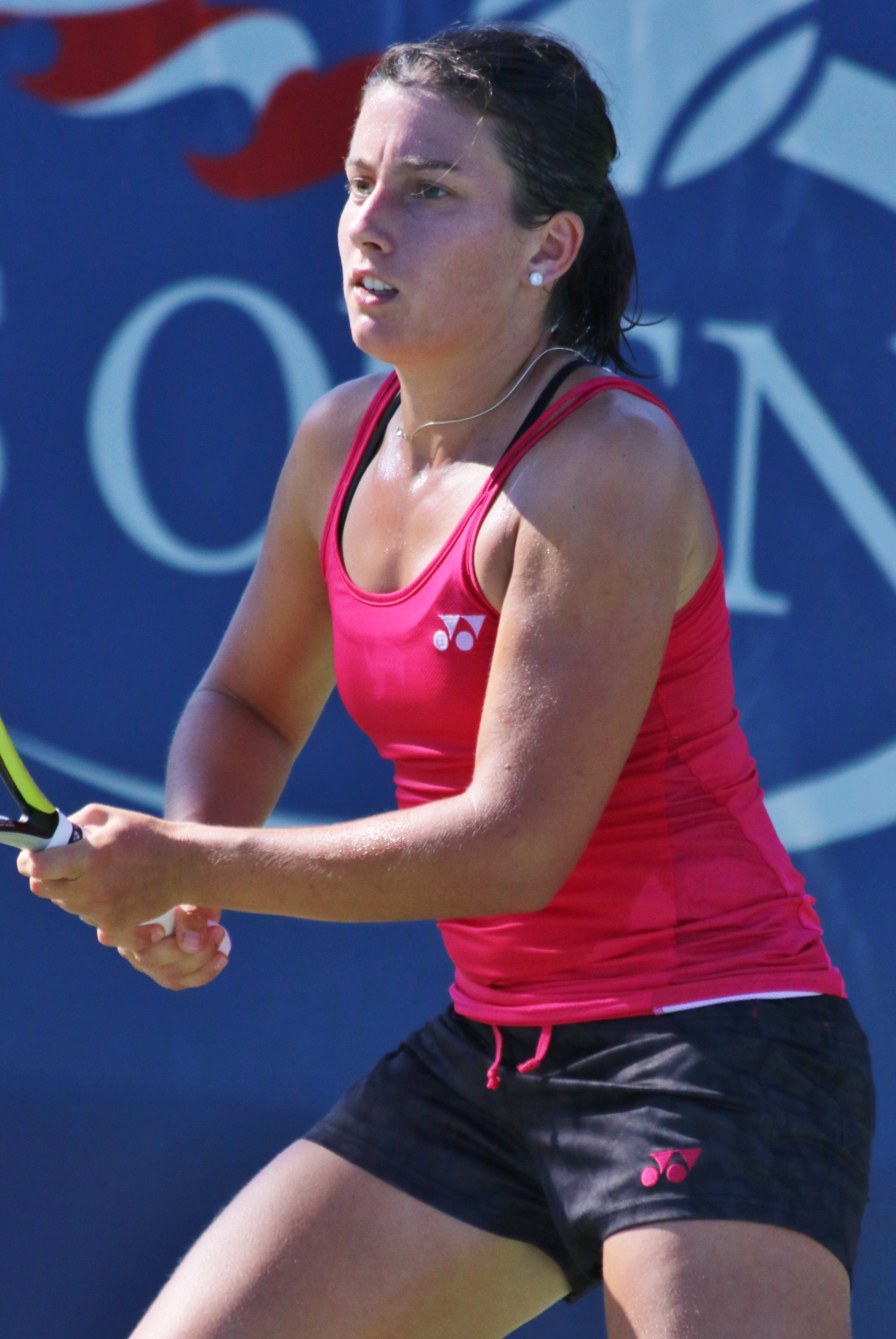 Sevastova US16 (6)